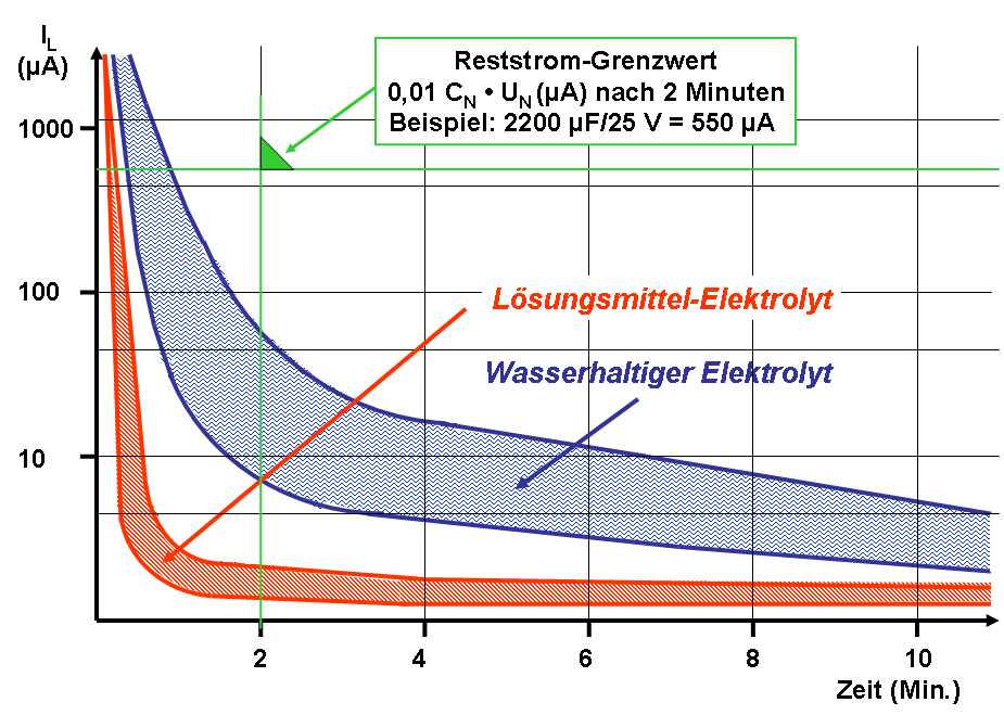 Reststrom-Einschaltverhalten von Al-Elkos mit wasserhaltigem Elektrolyten verglichen mit dem von Elkos mit Lösungsmittel-Elektrolyten